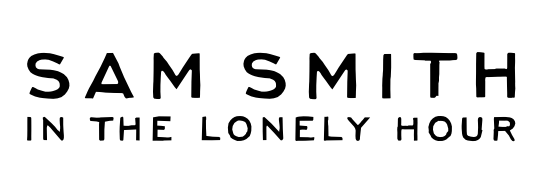 Imagen vectorizada de la cubierta del álbum debut del cantante británico Sam Smith, In the Lonely Hour (2014).